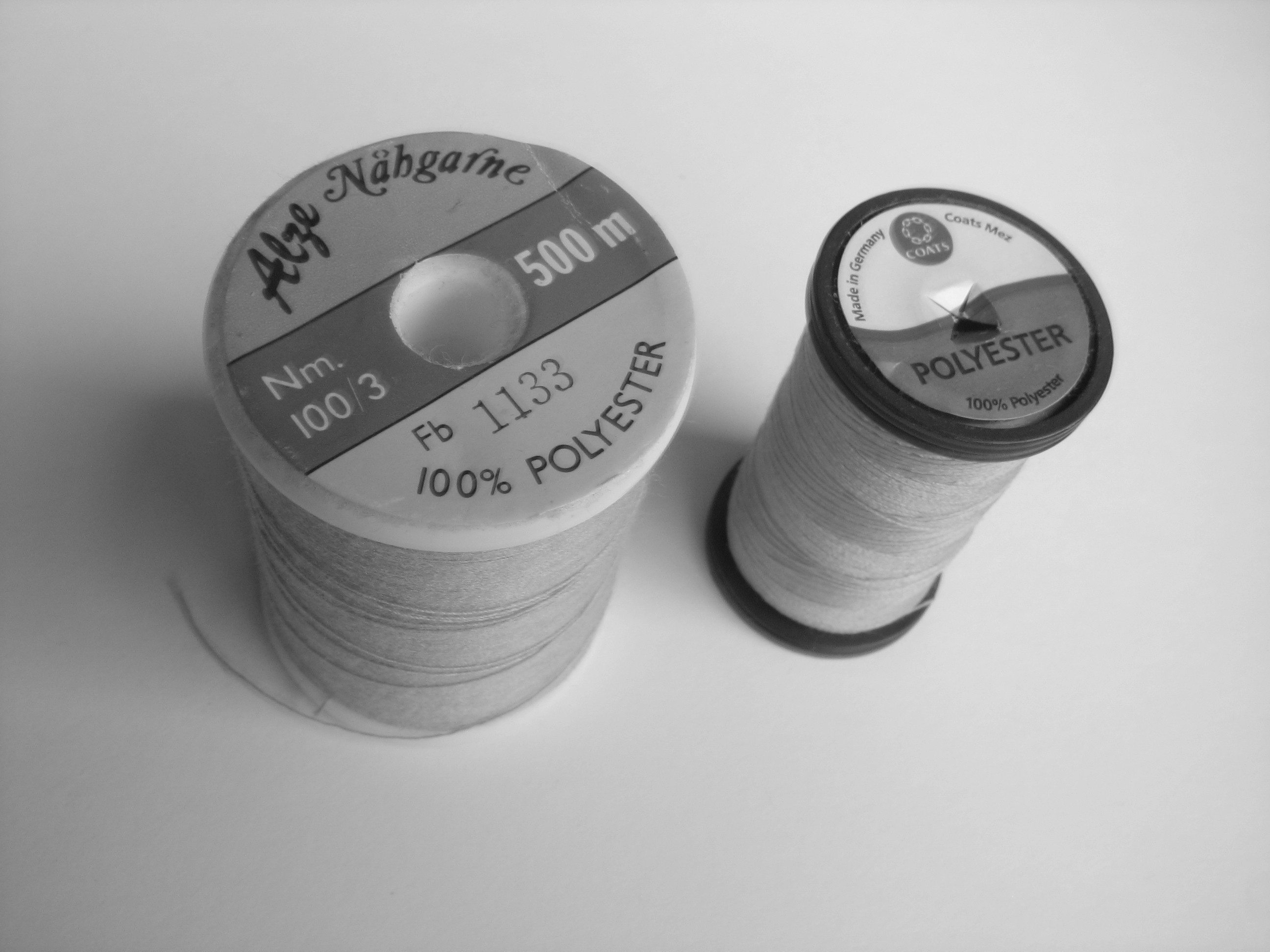 Sici nite pro domacnost